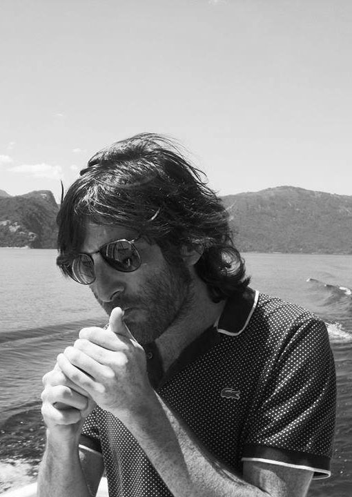 Juan Arabia